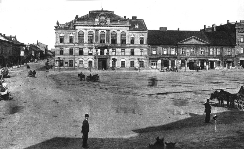 Ratusz podgórski